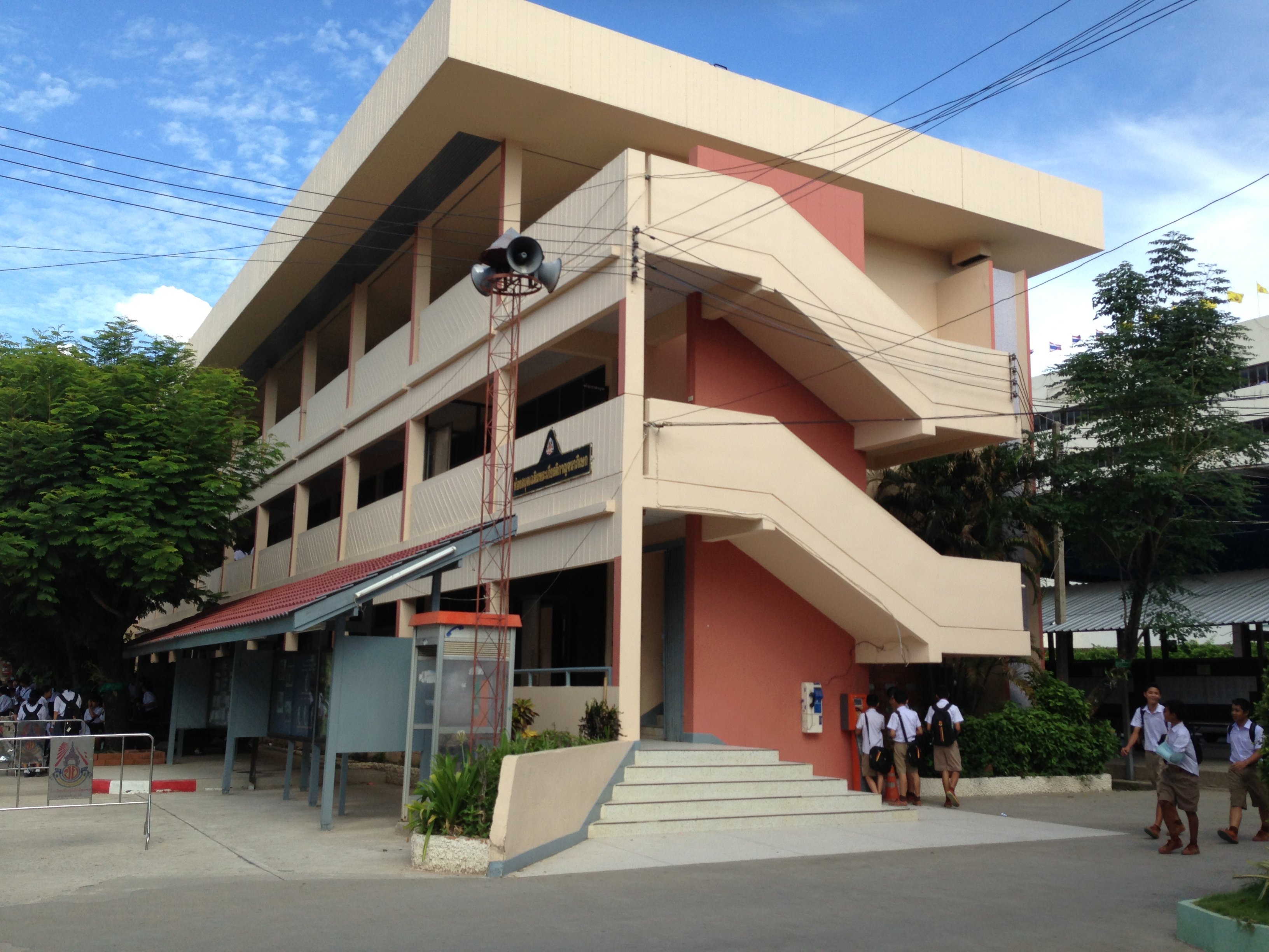 อาคาร 1 แบ่งออกเป็น 3 ชั้นโดยชั้นแรกเป็นชั้นห้องปฏิบัติการคอมพิวเตอร์ ชั้นที่สองเป็นที่ตั้งของ ห้องสมุดกลาง โรงเรียนชัยภูมิภักดีชุมพล และชั้นที่สาม เป็นห้องปฏิบัติการคอมพิวเตอร์